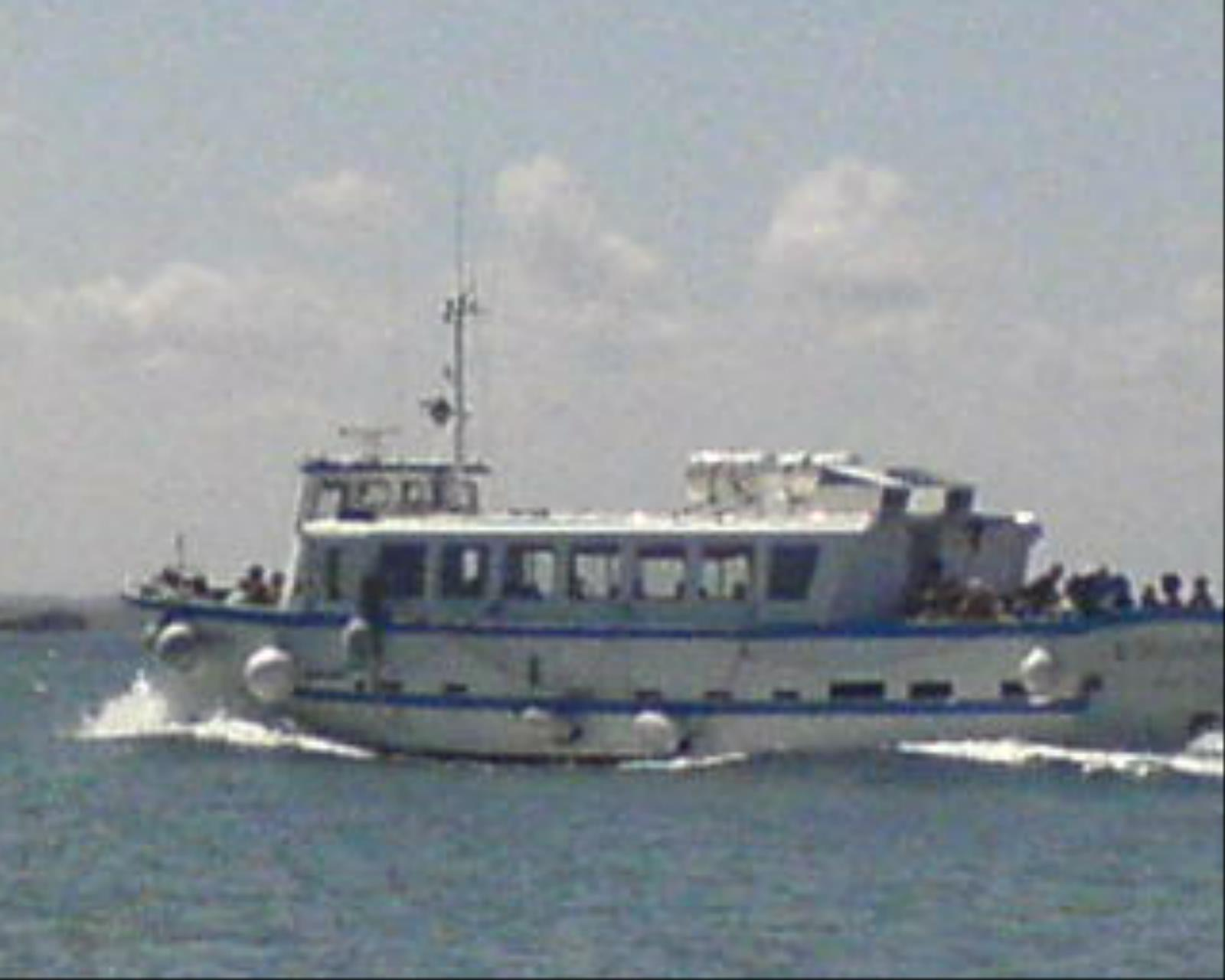 Vedette à passagers Fée des Légendes